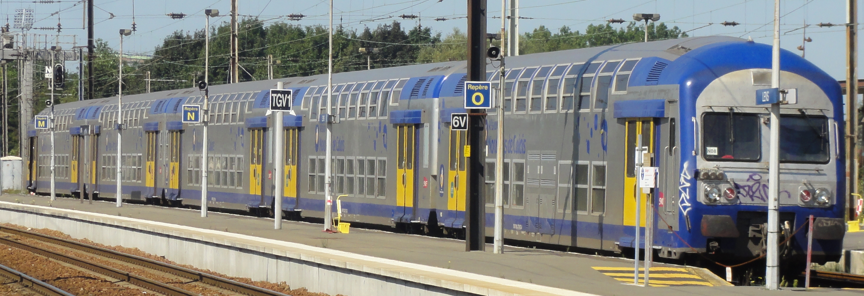 Gare de Lens, Pas-de-Calais, Nord-Pas-de-Calais, France.